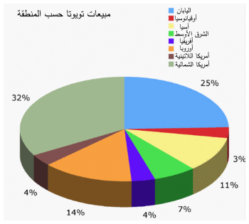 نسخة عربية من